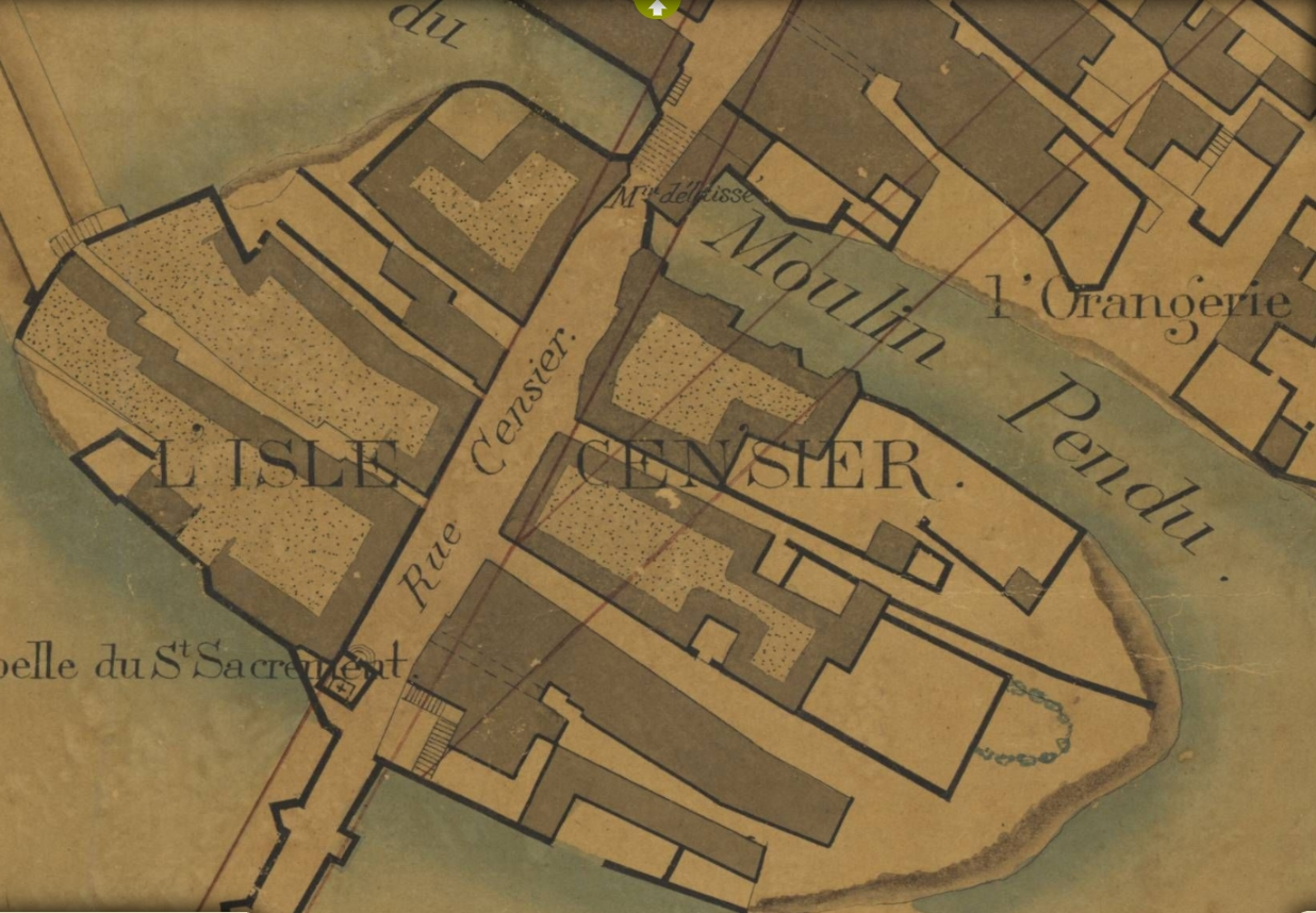 Saumur: Ile Censier, Maison de la Reine de Sicile